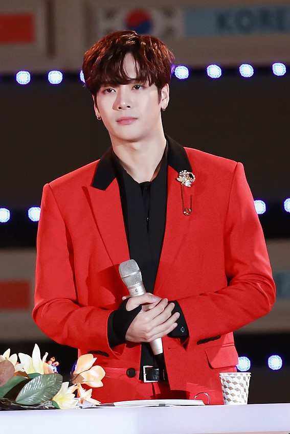 171014 우정슈퍼쇼